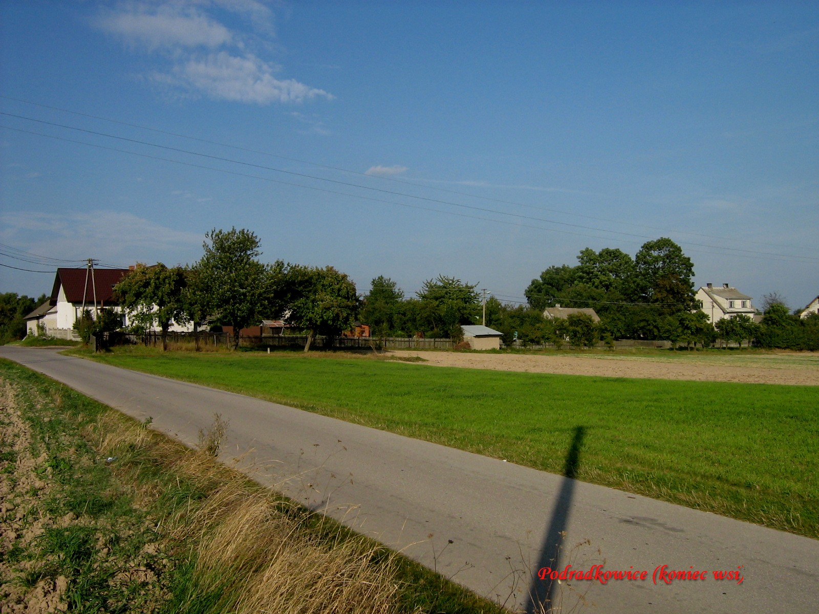 Podradkowice, Poland